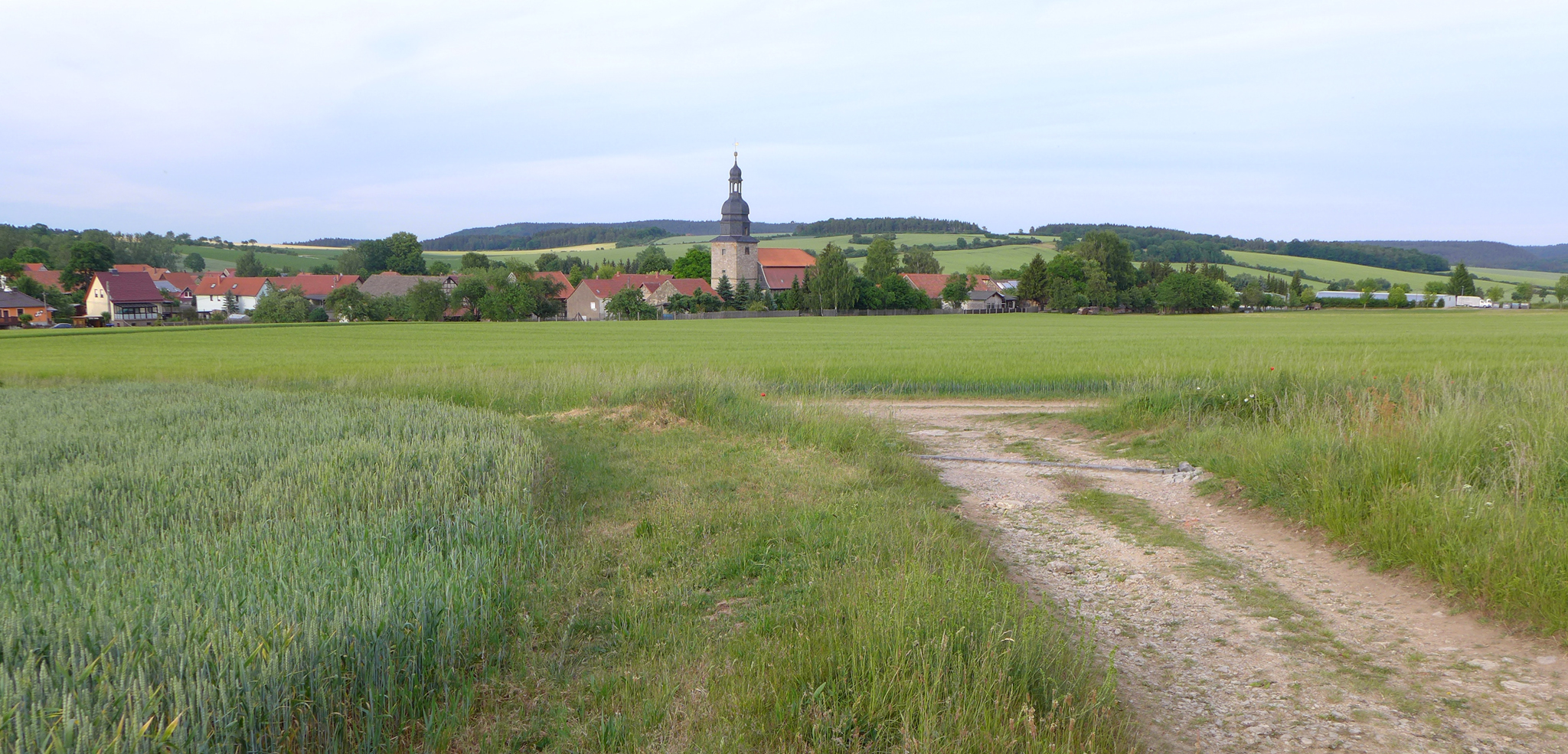 Blick auf Ellichleben mit Kirche, Landschaftspanorama, Blick von Süden im Juni 2015